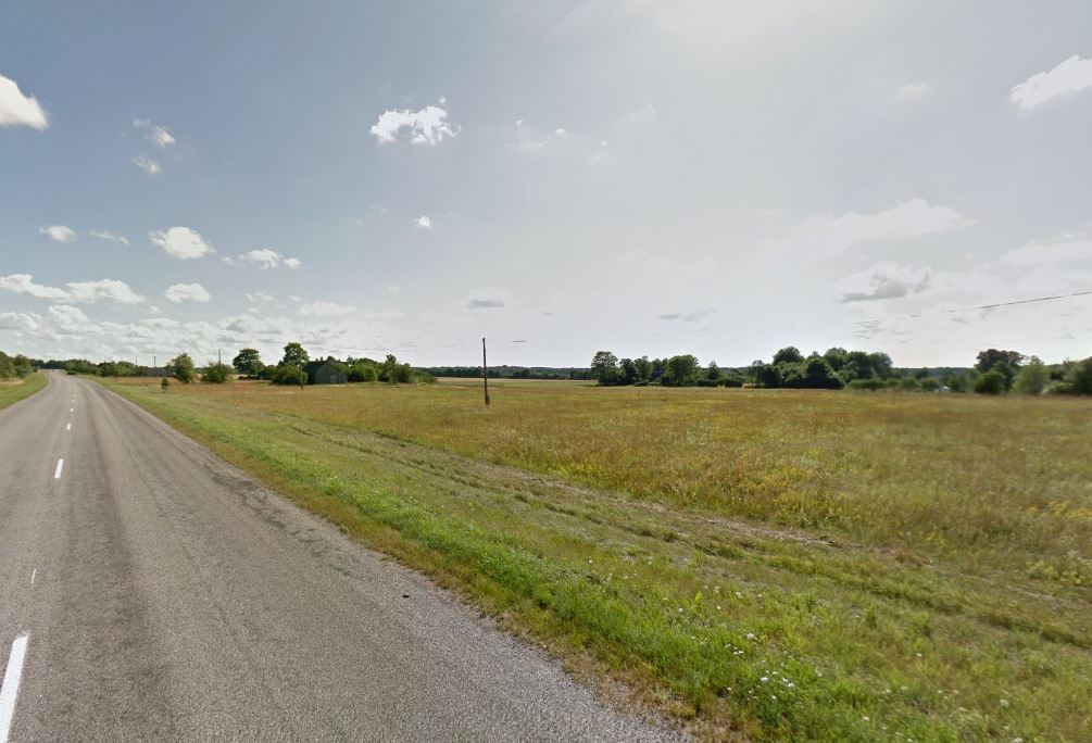 La ville d'Estonie Aru